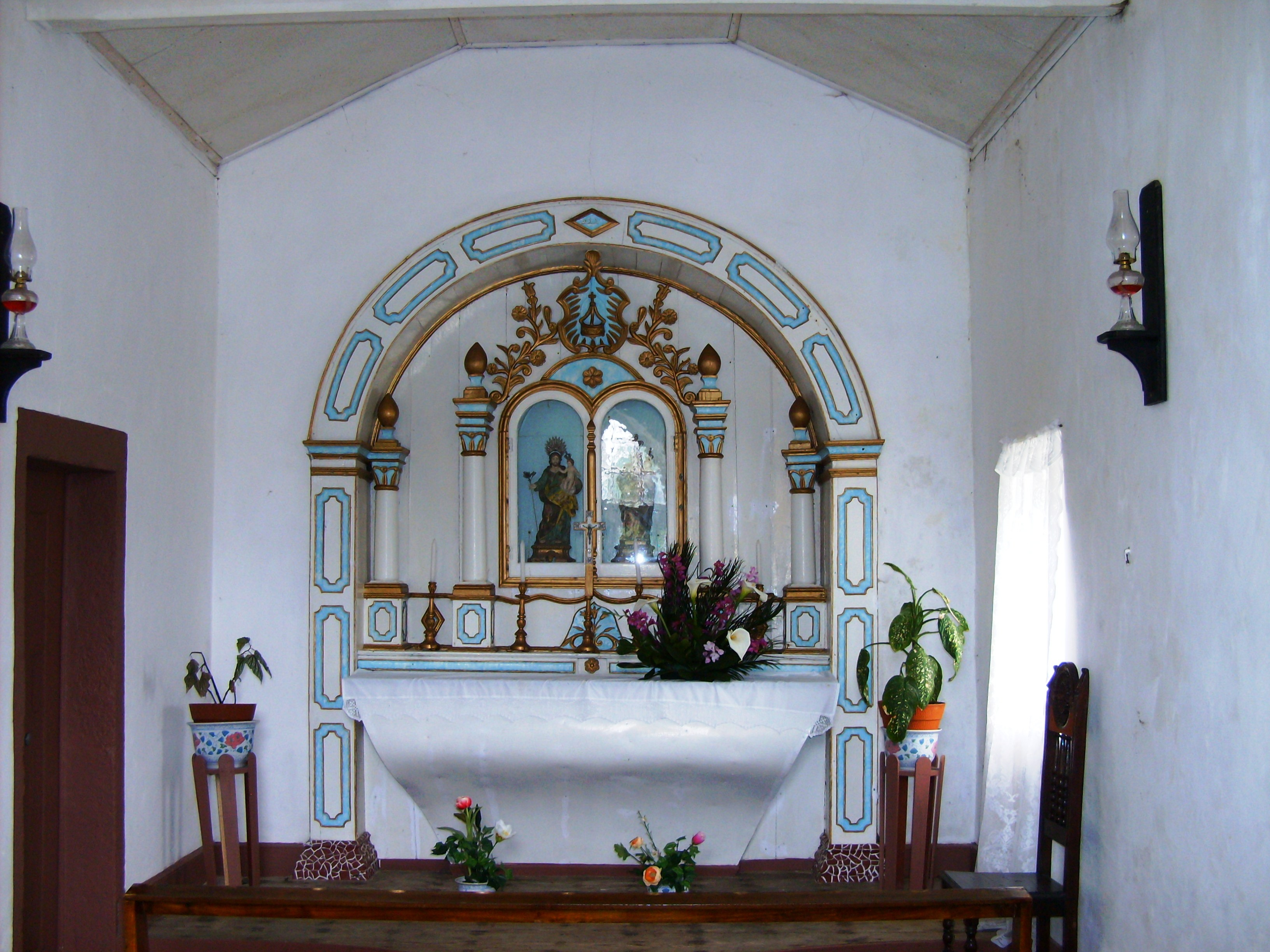 Ermida de Nossa Senhora da Saúde, Ilha de Santa Maria (Açores), Portugal.